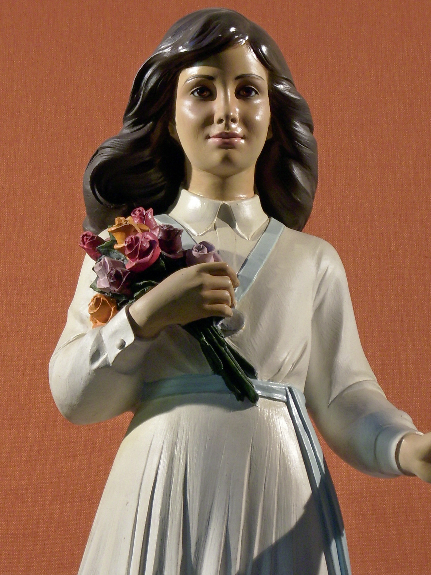 Figura de la beata Laura Vicuña (Santiago de Chile, 5 de abril de 1891 –Junín de los Andes, Argentina, 22 de enero de 1904), ubicada al interior del Templo Votivo de Maipú.